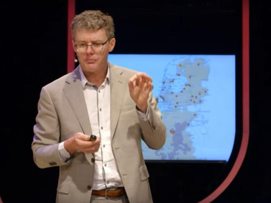 Leidse hoogleraar Leo Lucassen geeft college, Universiteit van Nederland (1/5) Hoe heeft massa-immigratie Nederland rijk gemaakt? (14 dec. 2015). YouTube